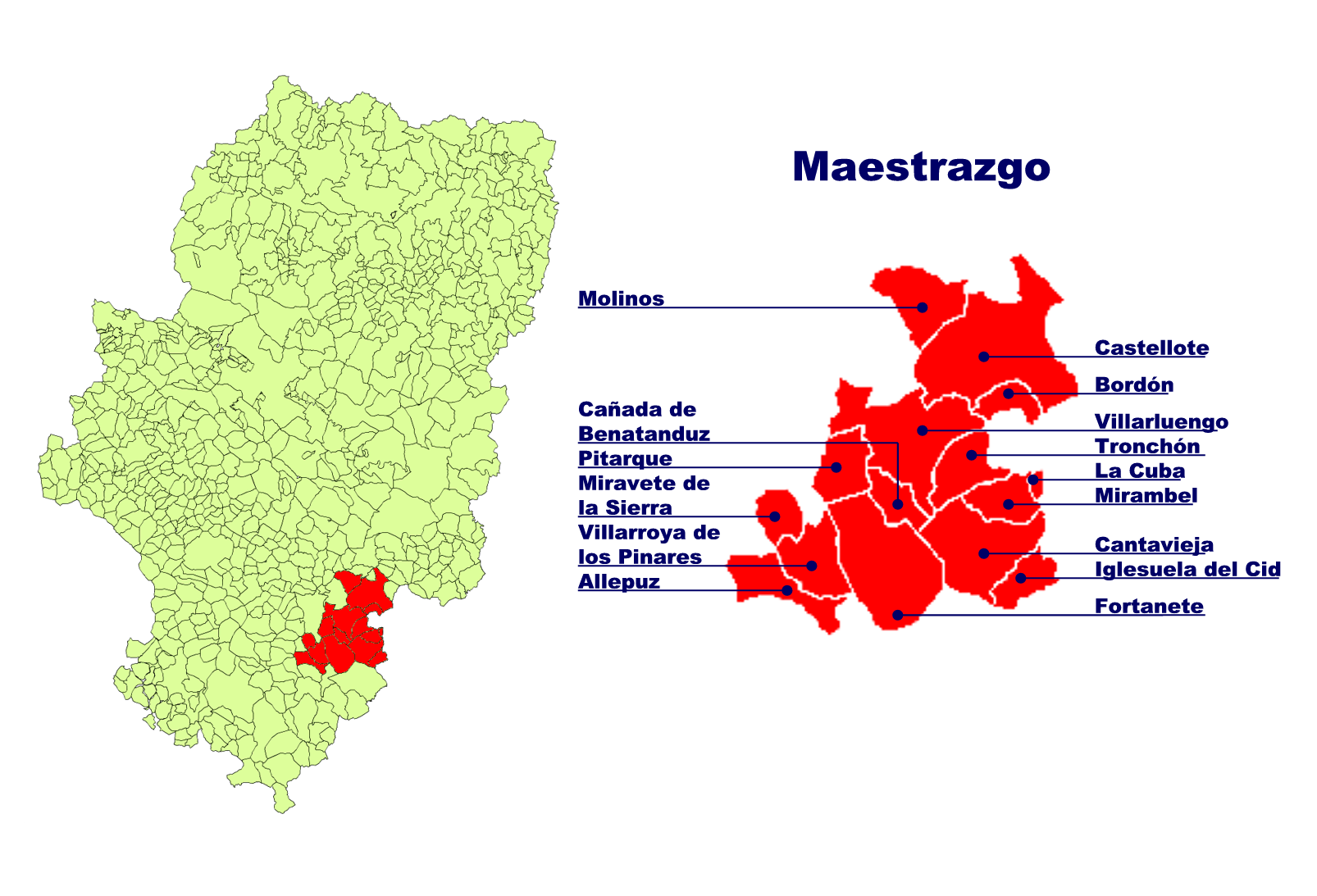 Comarca del Maestrazgo Creado el 03.11.2005 por Ecelan en base a Image:Aragon municipalities.png